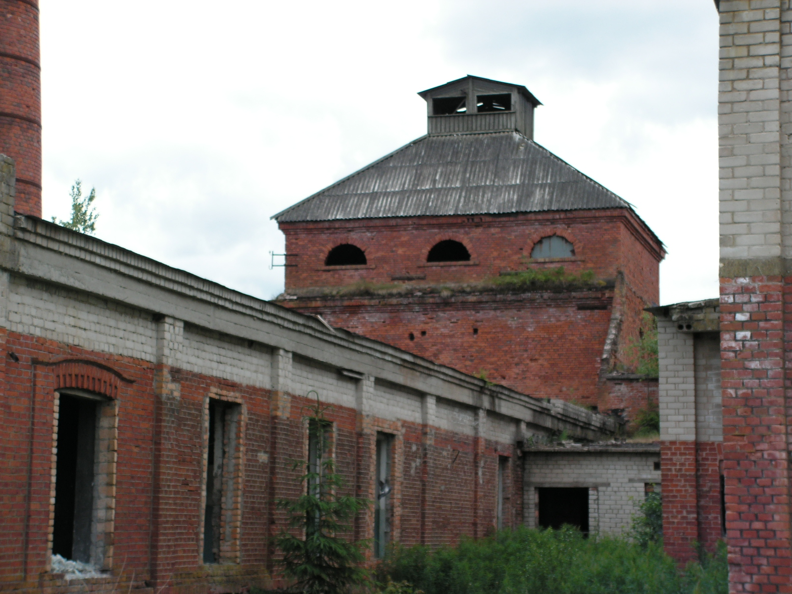 Abja linavabriku varemed 2011 aastal. Pildil on näha nõukogude okupatsiooni ajal tehtud ümberehitused (valge silikaattellisega, hooned on ehitatud kõrgemaks ja laed-katused asendatud) (Foto: Raimo Ilsjan)